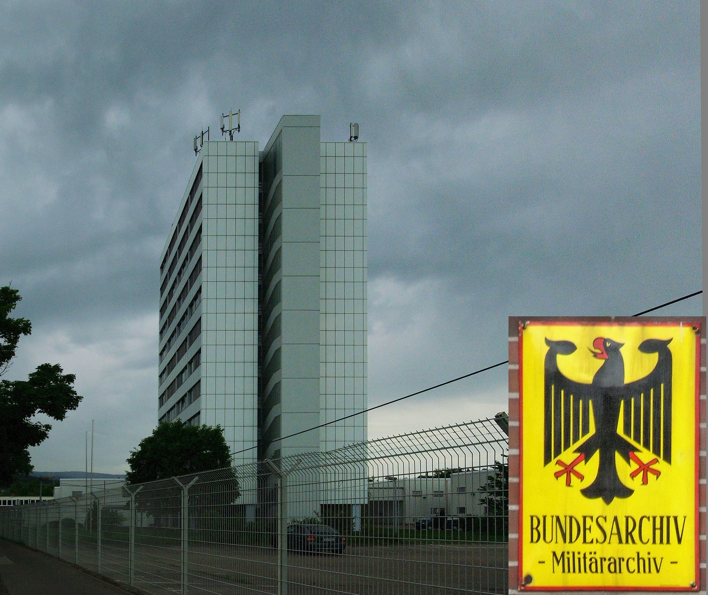 Bundesarchiv Miltärarchiv in Freiburg St. Georgen